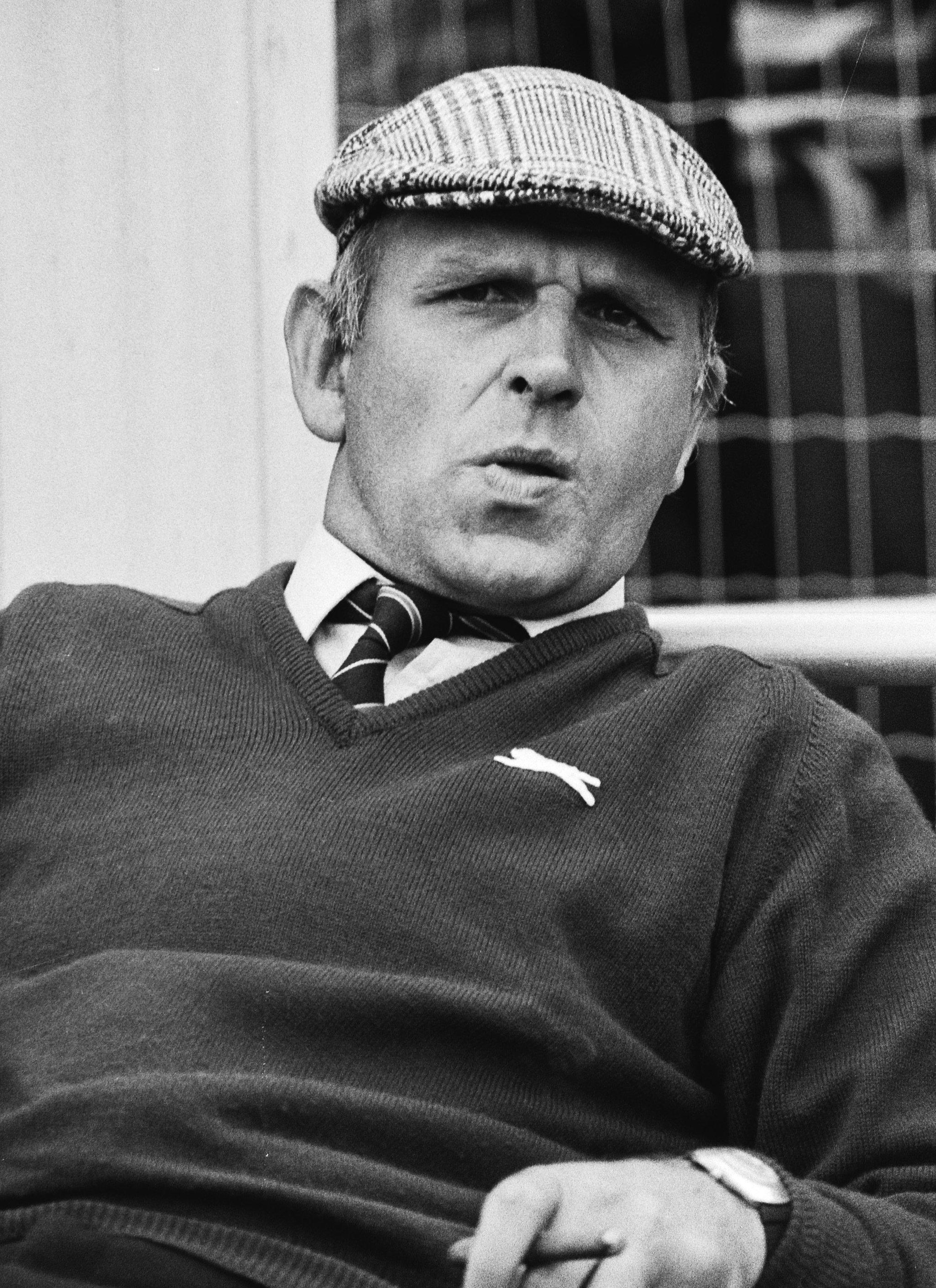 Collectie / Archief : Fotocollectie Anefo Reportage / Serie : Sparta tegen Feyenoord 1-2 Beschrijving : Sparta-trainer Barry Hughes Datum : 24 augustus 1980 Locatie : Rotterdam, Zuid-Holland Trefwoorden : portretten, sport, trainers, voetbal Persoonsnaam : Hughes, Barry Fotograaf : Dijk, Hans van / Anefo Auteursrechthebbende : Nationaal Archief Materiaalsoort : Negatief (zwart/wit) Nummer archiefinventaris : bekijk toegang 2.24.01.05 Bestanddeelnummer : 930-9802